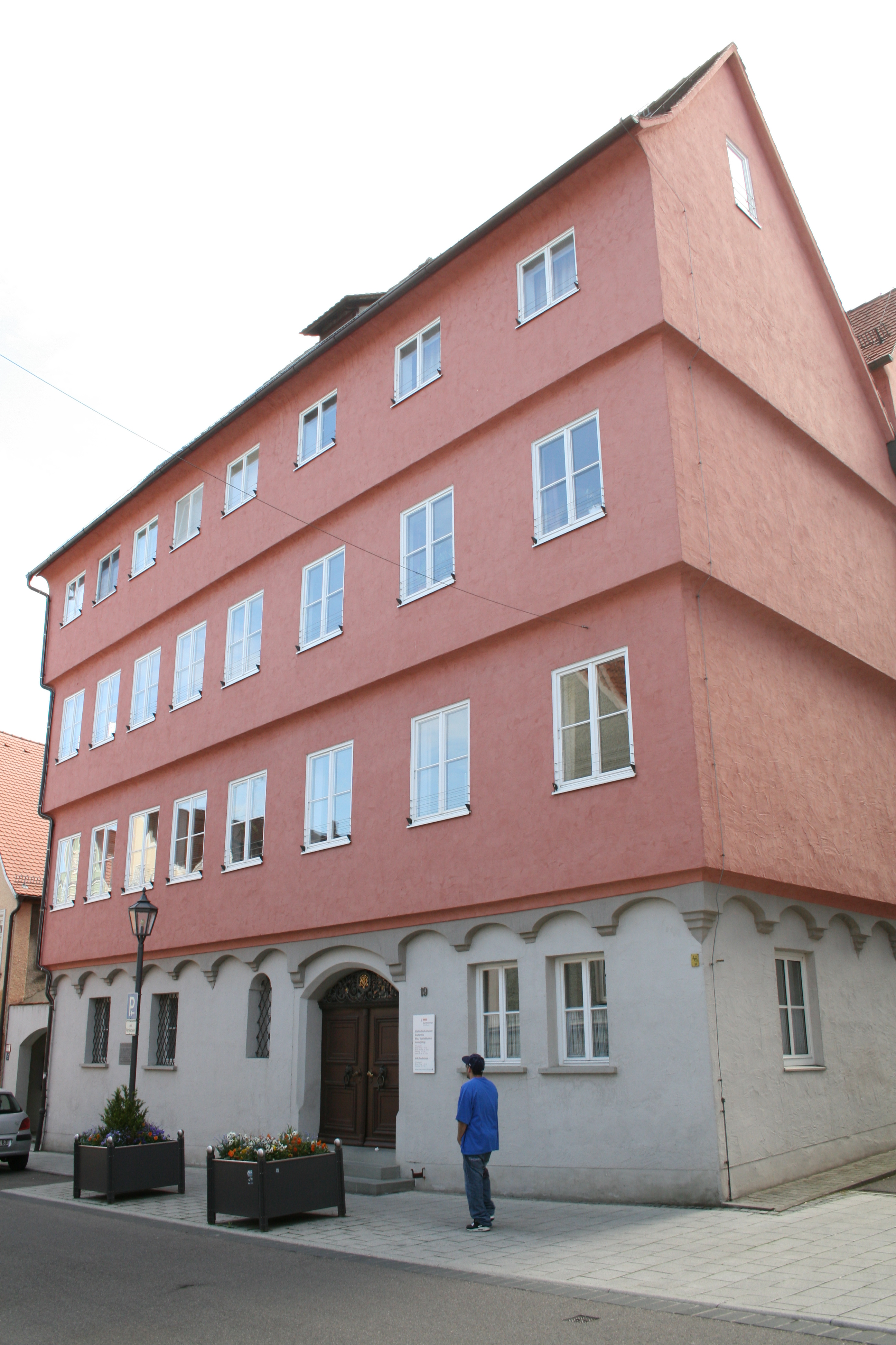 Das Grimmelhaus mit der Wissenschaftliche Stadtbibliothek Memminge